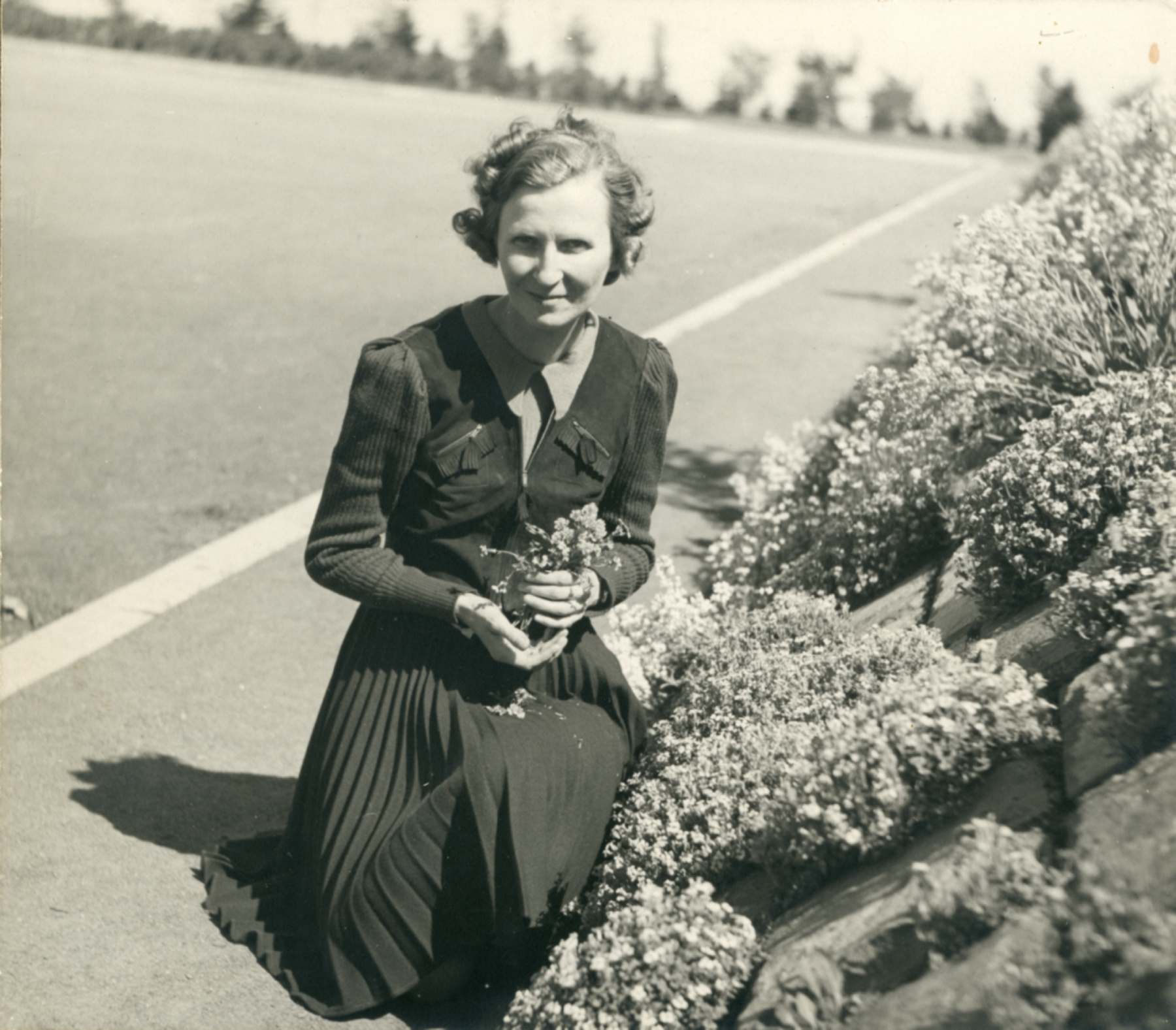 Marcelle Gauvreau, directrice de l'École de l'Éveil. 1941. Jardin Botanique de Montréal.